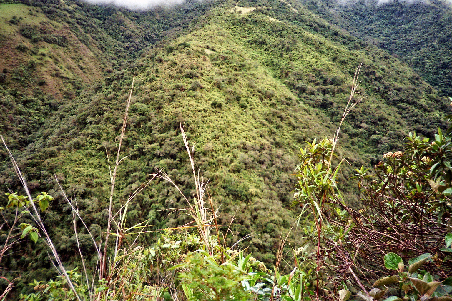 Cloud forest near Mindo, Ecuador